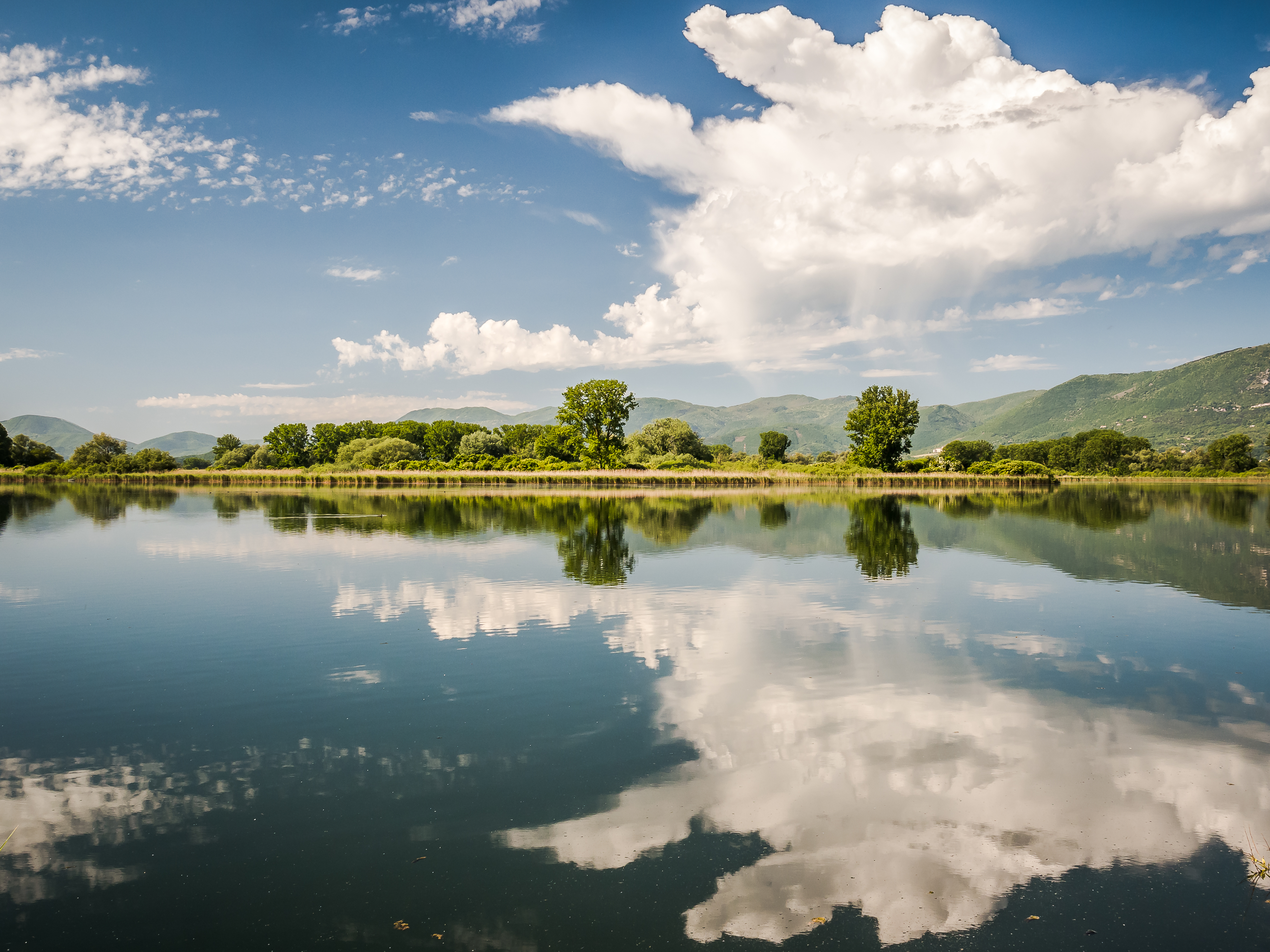 Riserva naturale Laghi Lungo e Ripasottile This is a photo of a monument which is part of cultural heritage of Italy.